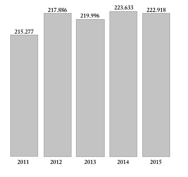 Kaynağından alınan nüfus bilgileriyle hazırlanan 2011-2015 yılları arası Erzincan nüfusu.